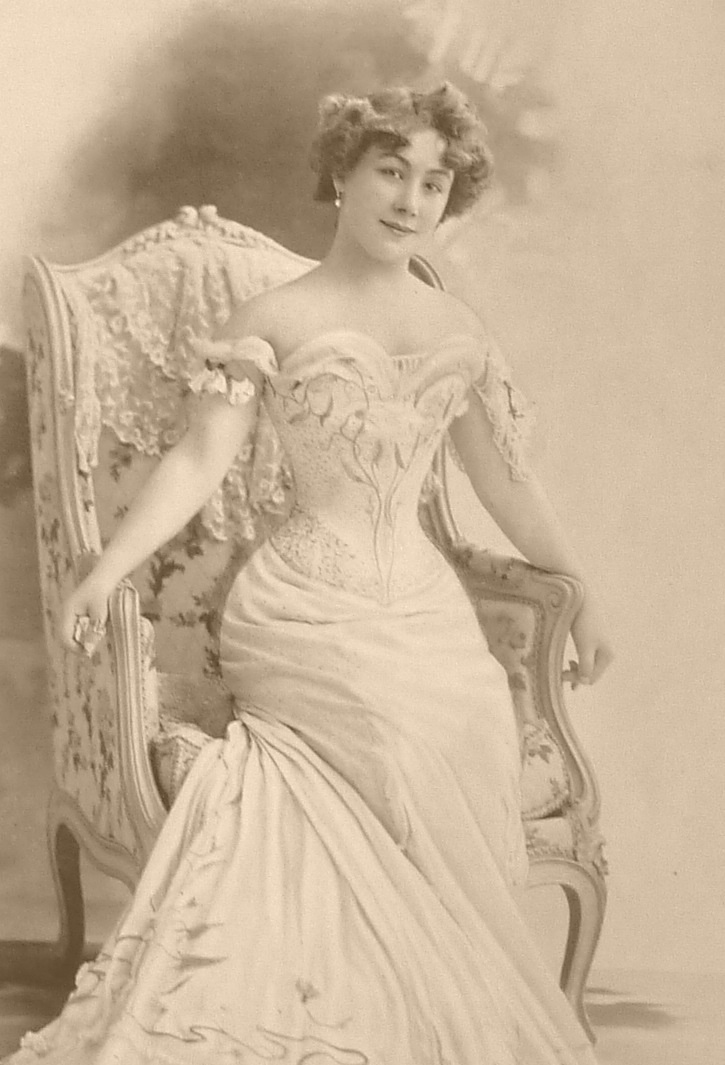 Magazine Le Théâtre n° 288_ Décembre 1910. Odette Dulac- Photo de Reutlinger (date cliché ca 1903)